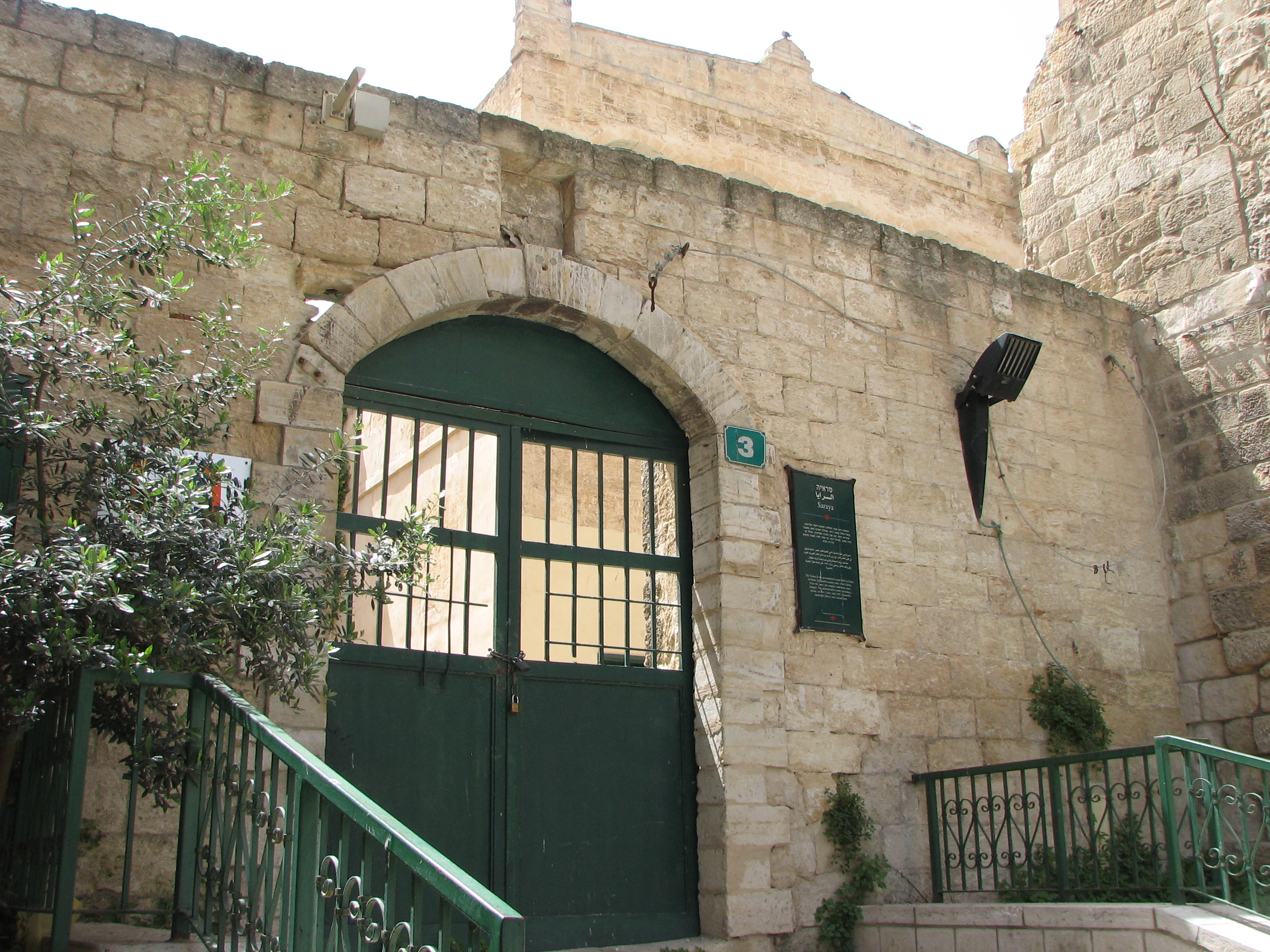 Saraya Building Nazareth was built by Daher el-Omar in 1740. The bulding was used as Governmental center בית הסראייה בעיר נצרת, הוא מבנה שהקים דאהר אל-עומר, שליט הגליל באמצע המאה ה-18, ואשר שימש כמרכז השלטוני בעיר. הבניין בין שתי הקומות הוקם בסביבות שנת 1740. הבניין שימש עד שנת 1991 כבית עיריית נצרת